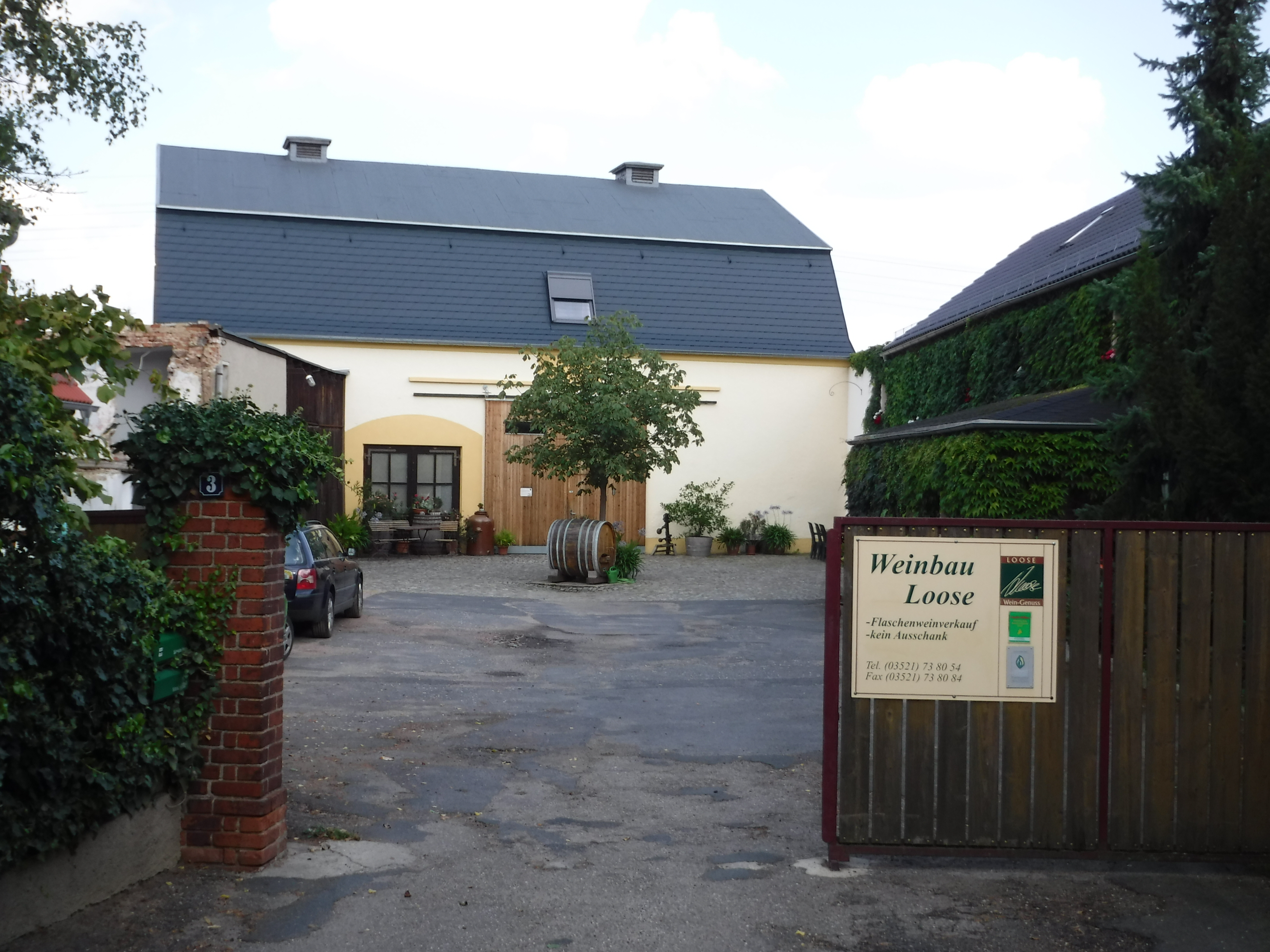 Weinbau Loose, Im Winkel 5, 01689 Niederau-Gröbern